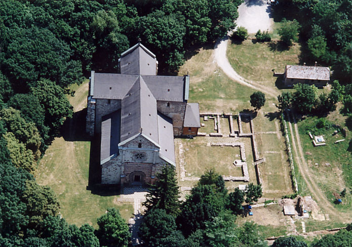 Abbey - Bélapátfalva - Hungary - Europe